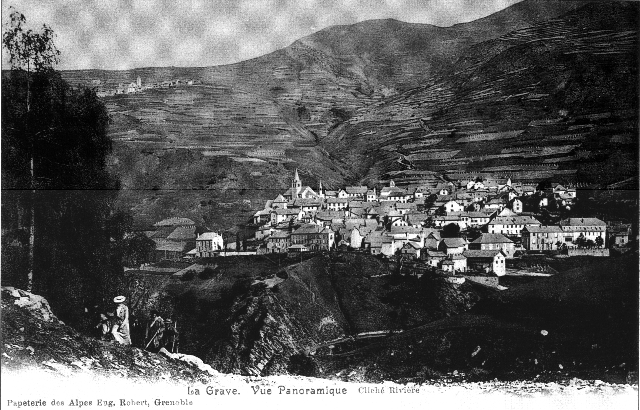 La Grave, vue panoramique.